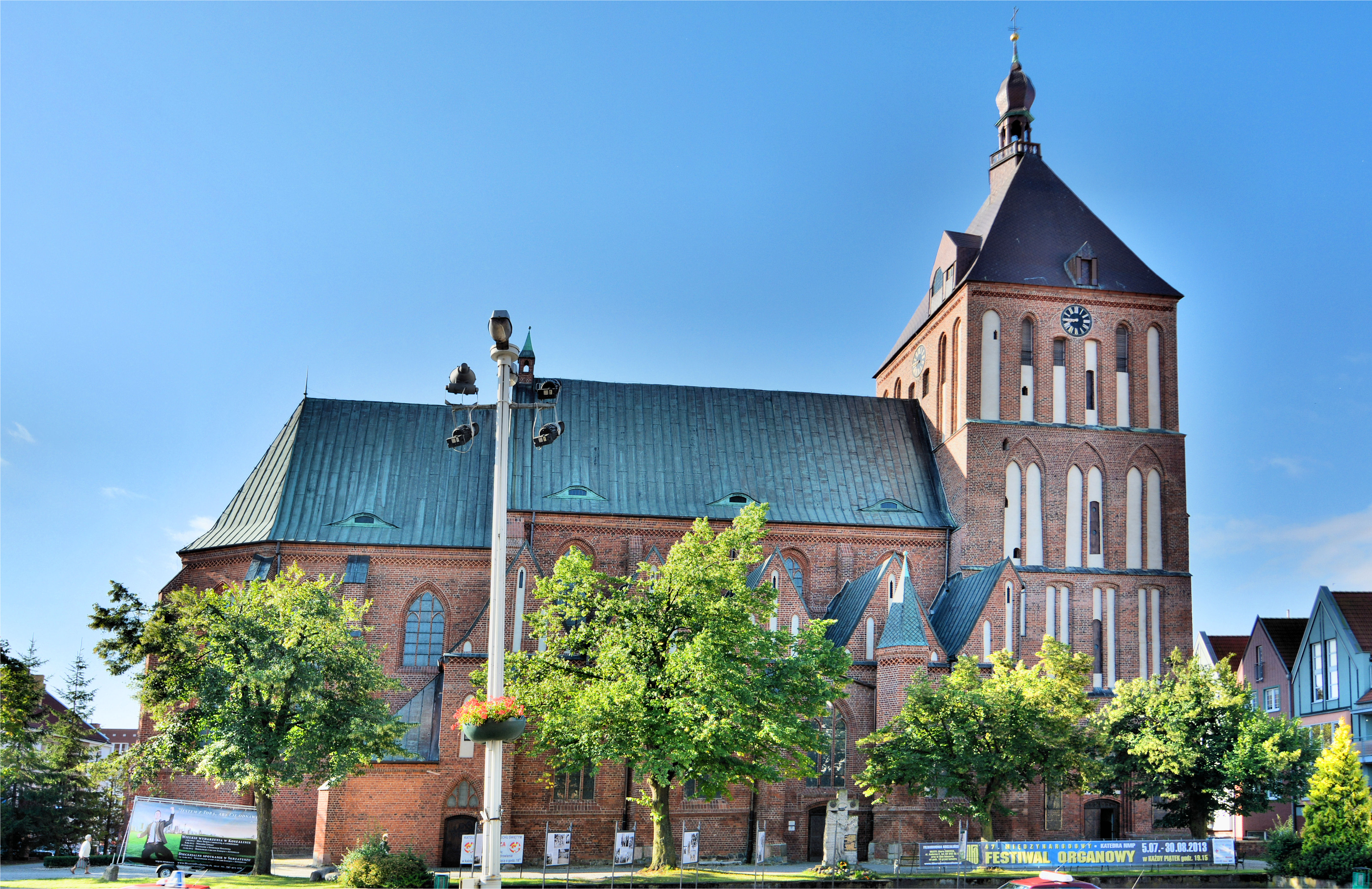 Koszalin, kościół katedralny p.w. Niepokalanego Poczęcia NMP, 1300-1333